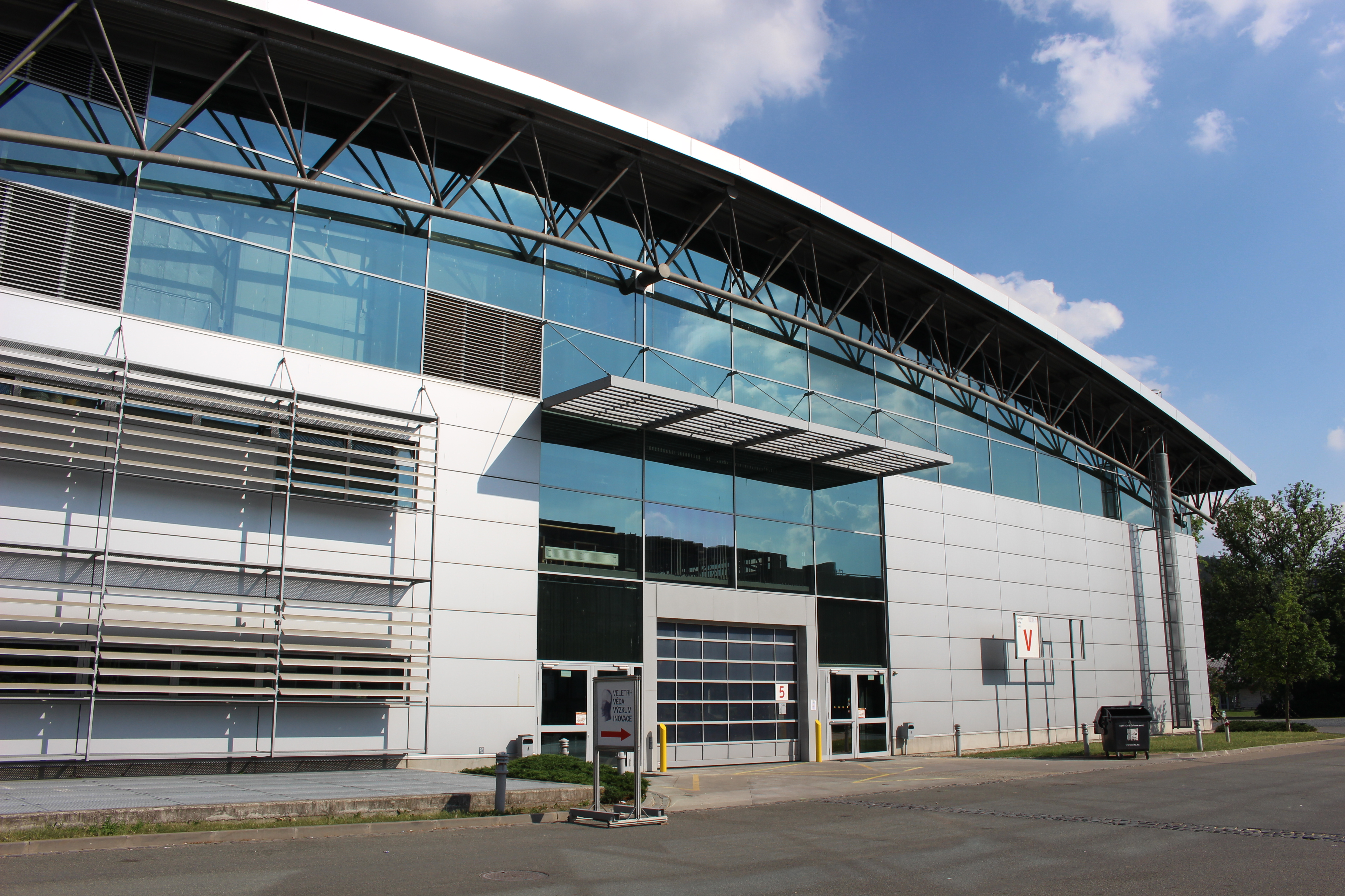 Pavilon V, Brněnské výstaviště